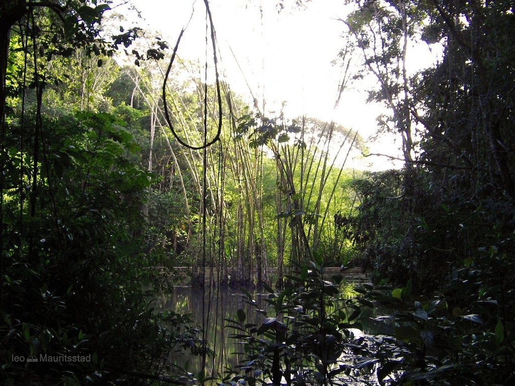 Vegetação de Mata Atlântica em Pernambuco, outrora comum em partes da Zona da Mata pernambucana